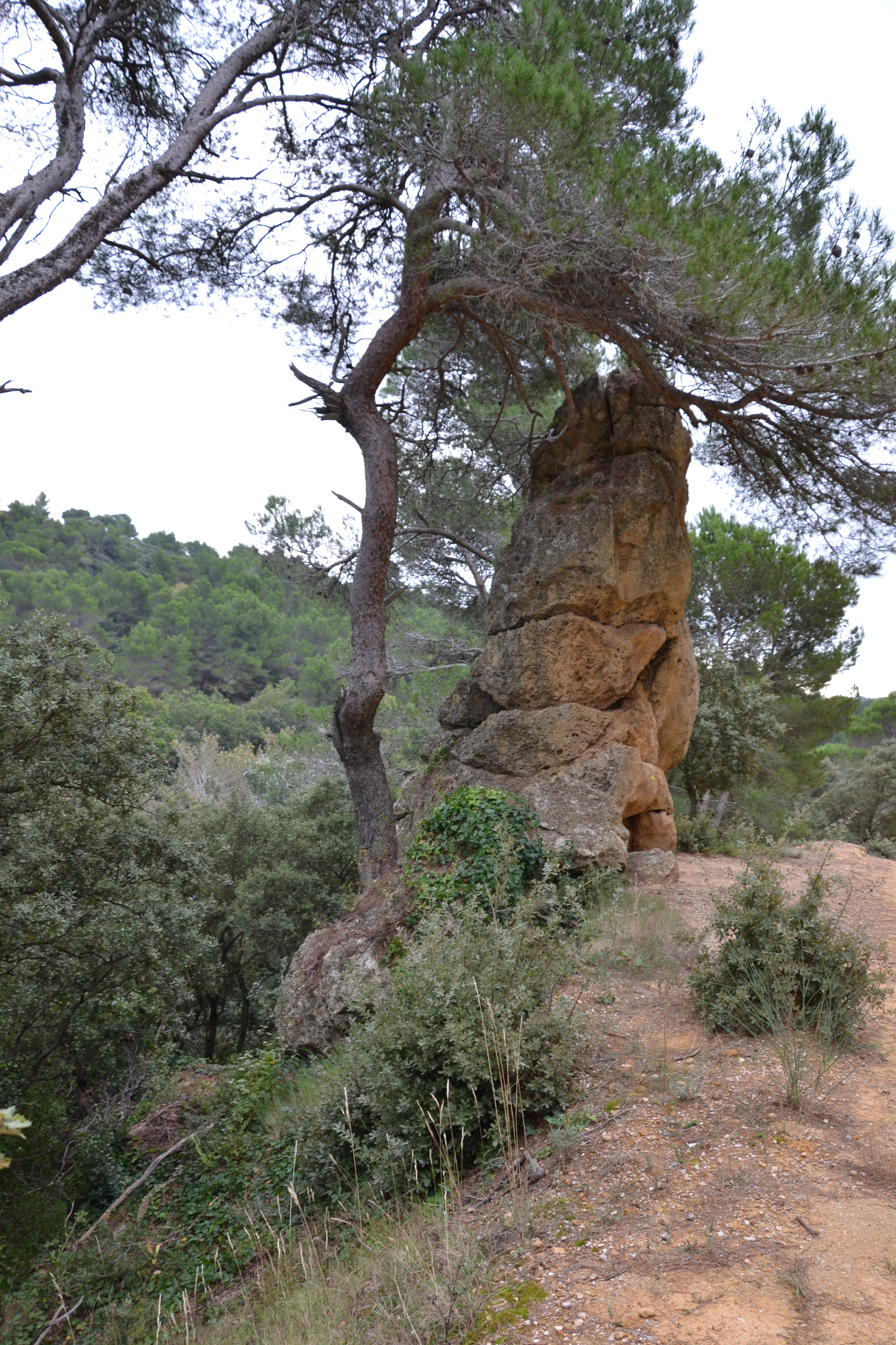 Menhir de Vacqueyras, formation géologique des dentelles de Montmirail